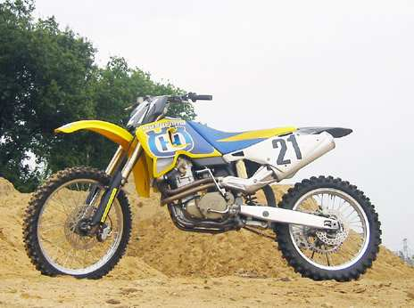 Husqvarna TC610 bj 2000. Deze foto heb ik gemaakt van de motor van mijn neef. Van hem mocht ik de foto wel op internet plaatsen.